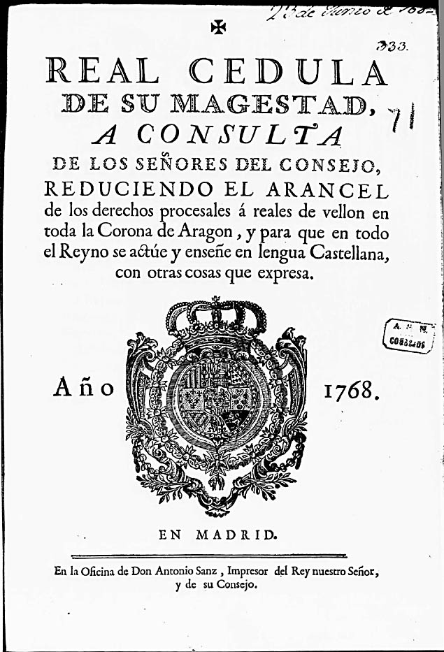 Real Cédula reduciendo el arancel de los derechos procesales a reales de vellón en toda la Corona de Aragón y para que en todo el Reino se actúe y enseñe en lengua castellana, con otras cosas que expresa.